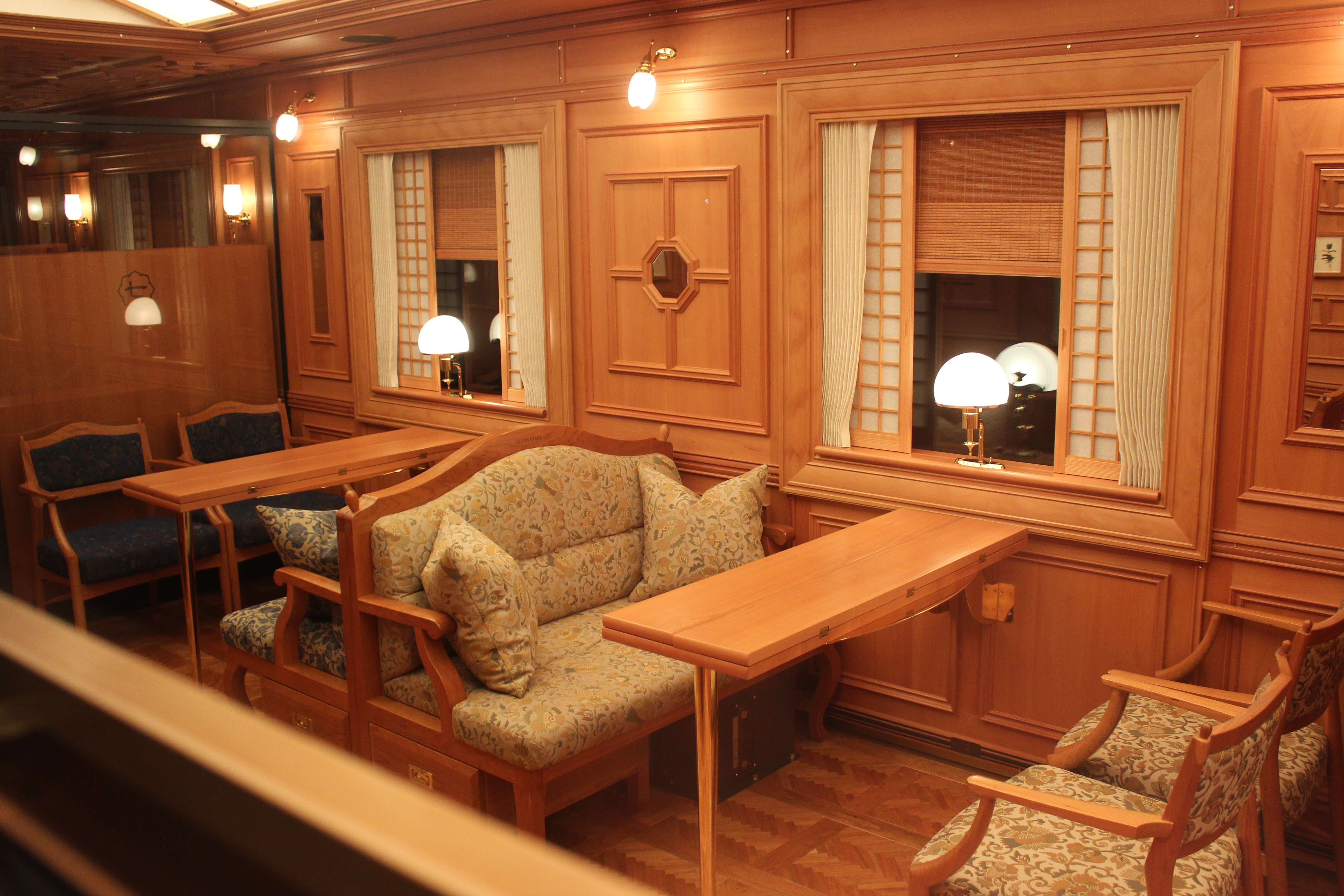 ななつ星in九州 マシフ77-7002 内部 ダイニングスペース